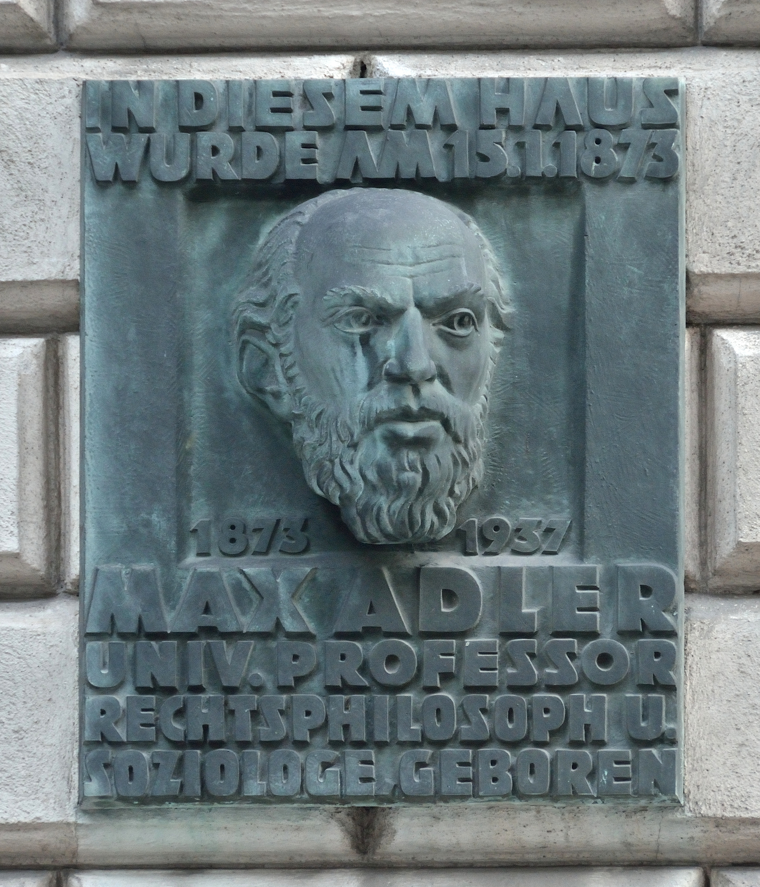 Gedenktafel am Haus Waschhausgasse 1a in Wien-Leopoldstadt an den hier geborenen Juristen, Politiker und Sozialphilosphen Max Adler.